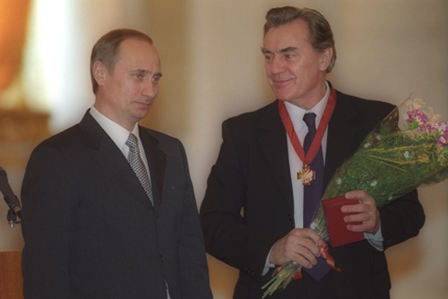 МОСКВА, КРЕМЛЬ. Вручение государственных наград. Орденом «За заслуги перед Отечеством» III степени награжден генеральный директор Малого театра Виктор Коршунов.